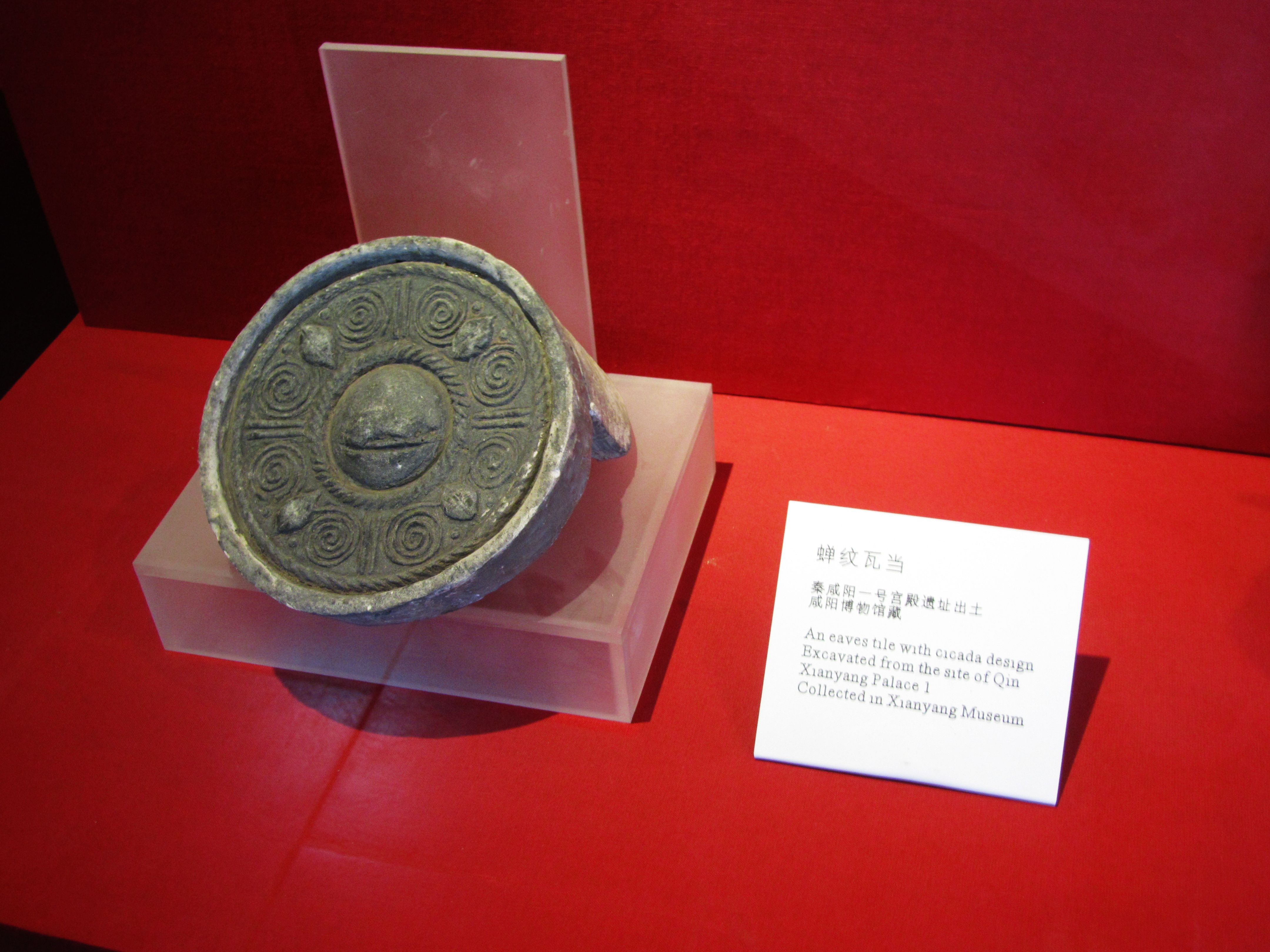 蝉纹瓦当，秦咸阳宫一号宫殿遗址出土，现藏咸阳博物馆。